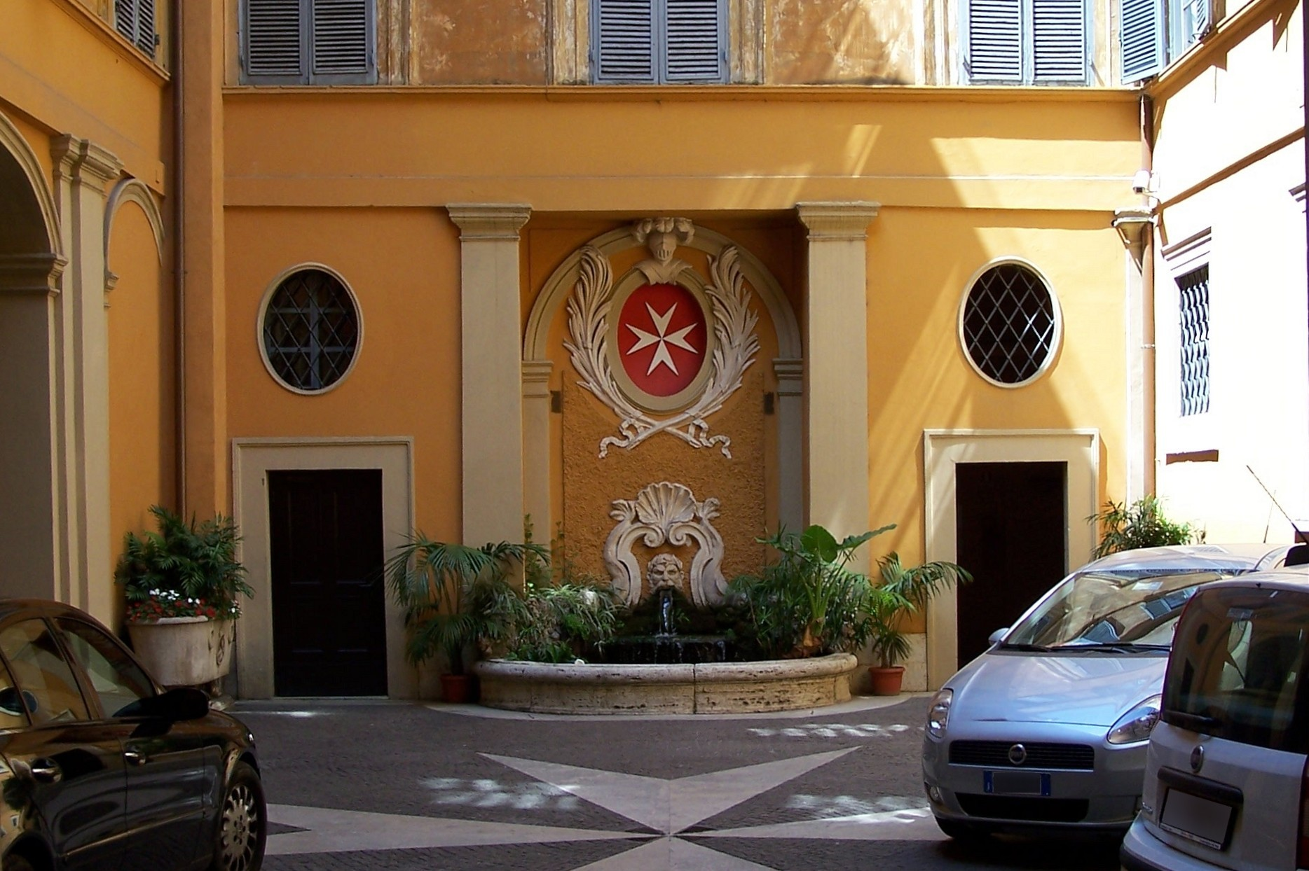 Anwesen des Malteserordens in Rom Via Condotti